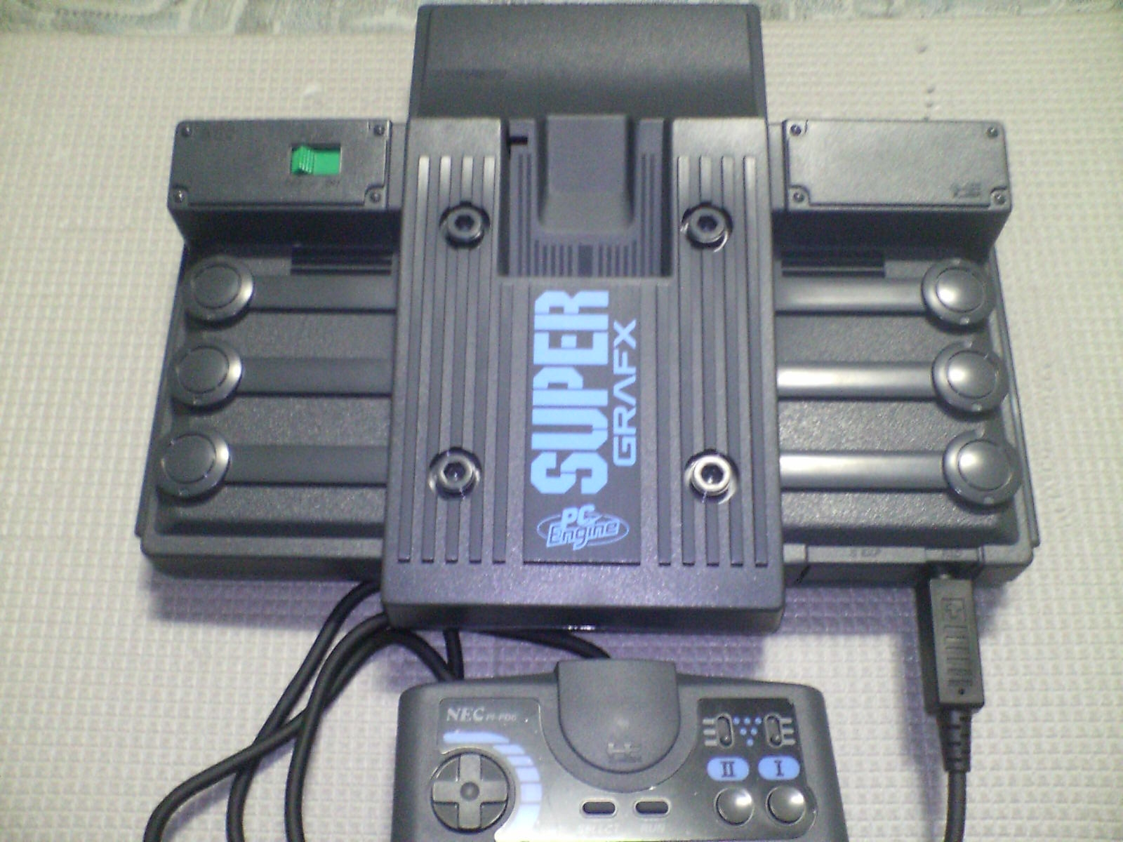 PC Engine Super Grafx